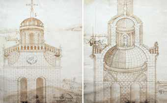 Traza del arquitecto Gaspar de Arce